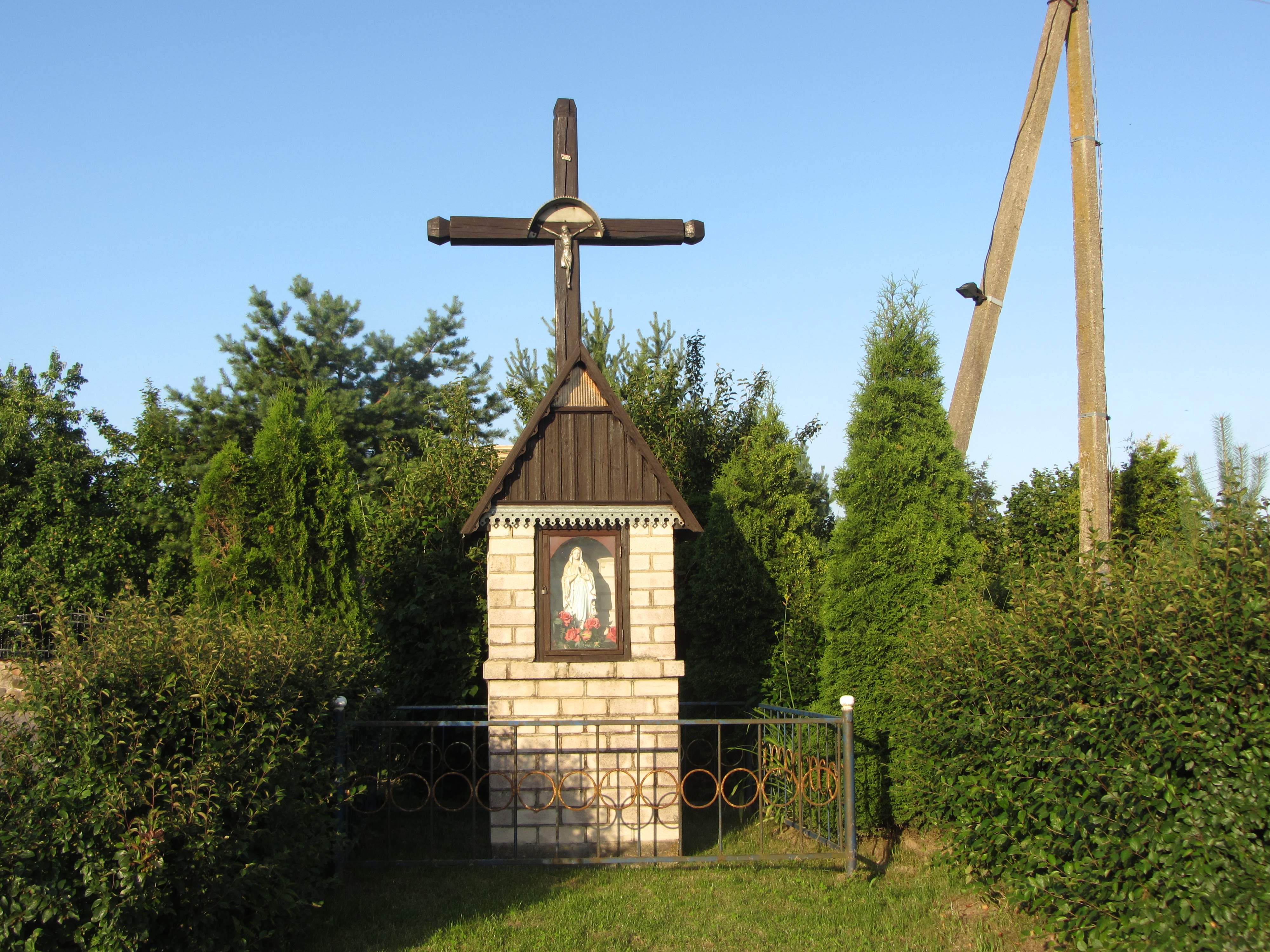 Grigaičiai, Lithuania